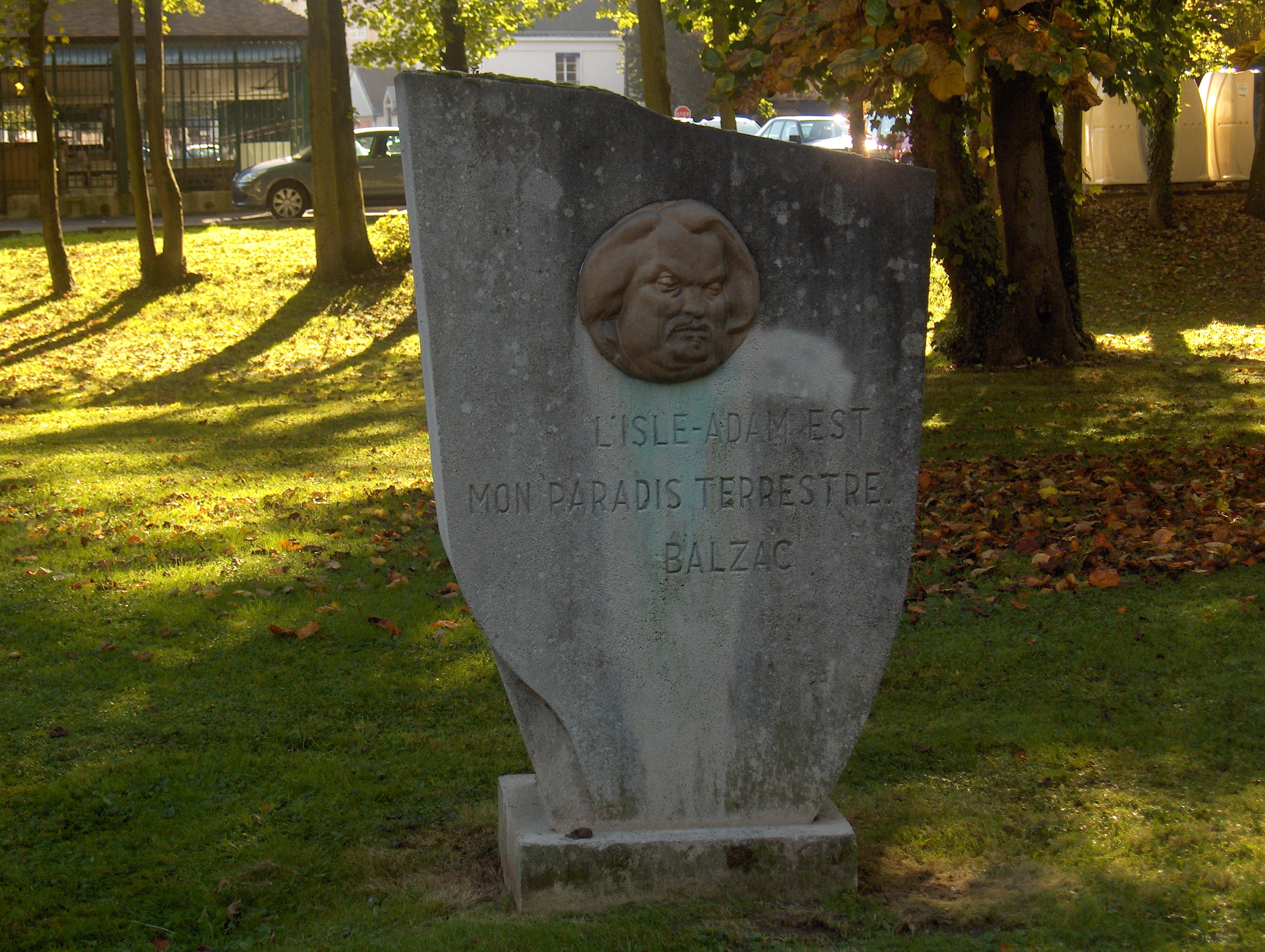 Monument dédié à Balzac à L'Isle-Adam. La citation est extraite d'une lettre de l'écrivain à sa sœur.